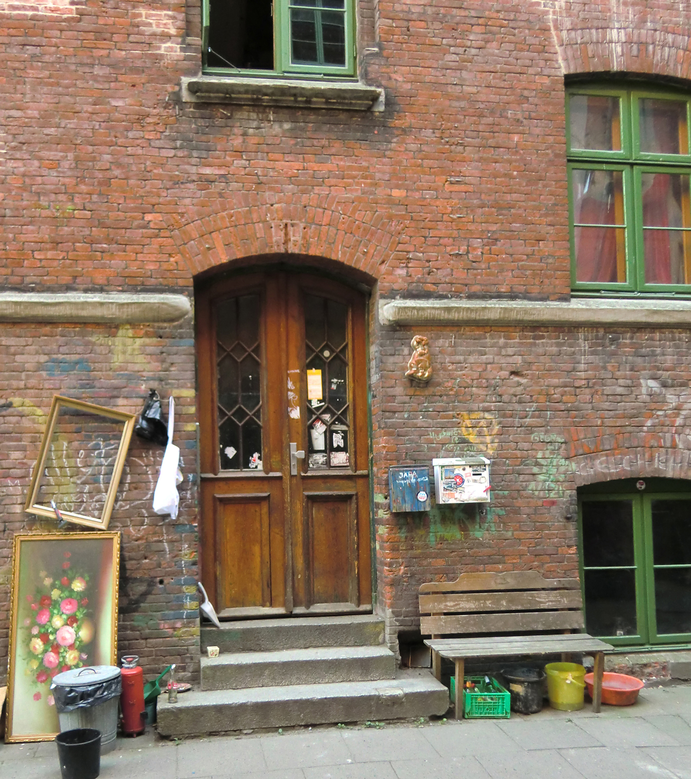 Hauseingang zu John Lennon's Rock'n Roll LP und CD, Jägerpassage, Wohlwillstraße 22, Hamburg; Jägerpassage 1; während des Gastspiels im Top-Ten-Club 1961 fotografierte Jürgen Vollmer John Lennon in dem vorderen Hauseingang. In dem hinteren Eingang, Jägerpassage 2 wurde Jakie Lomax der Liverpooler Band The Undertakers hier von Astrid Kirchherr fotografiert.